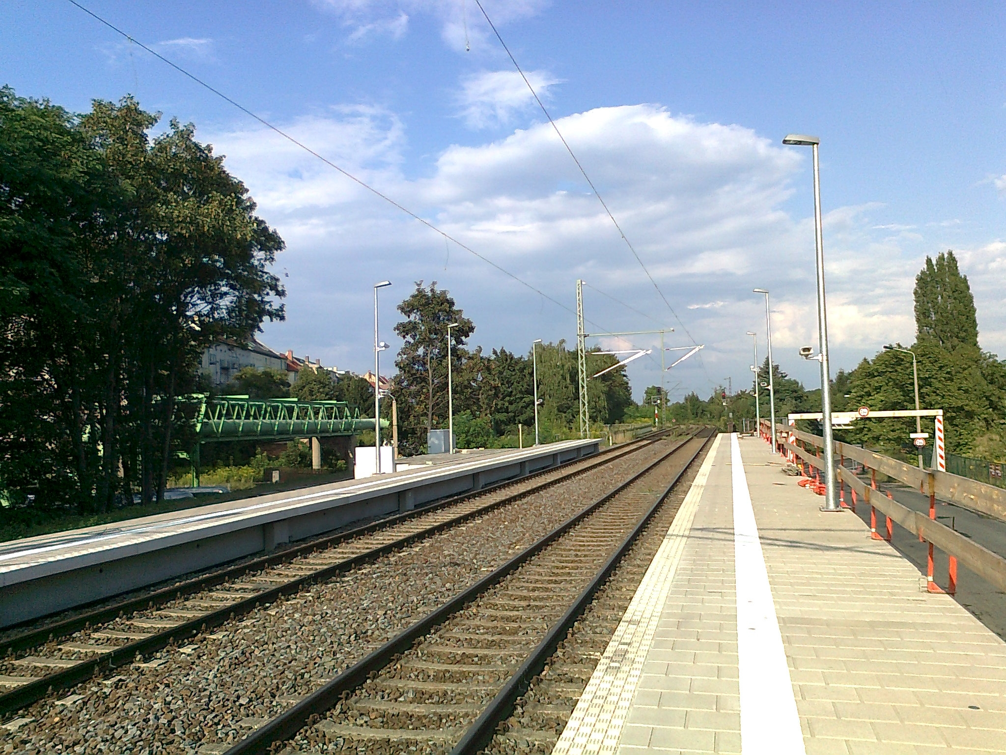 Neubau der S-Bahn Station Leipzig Anger-Crottendorf